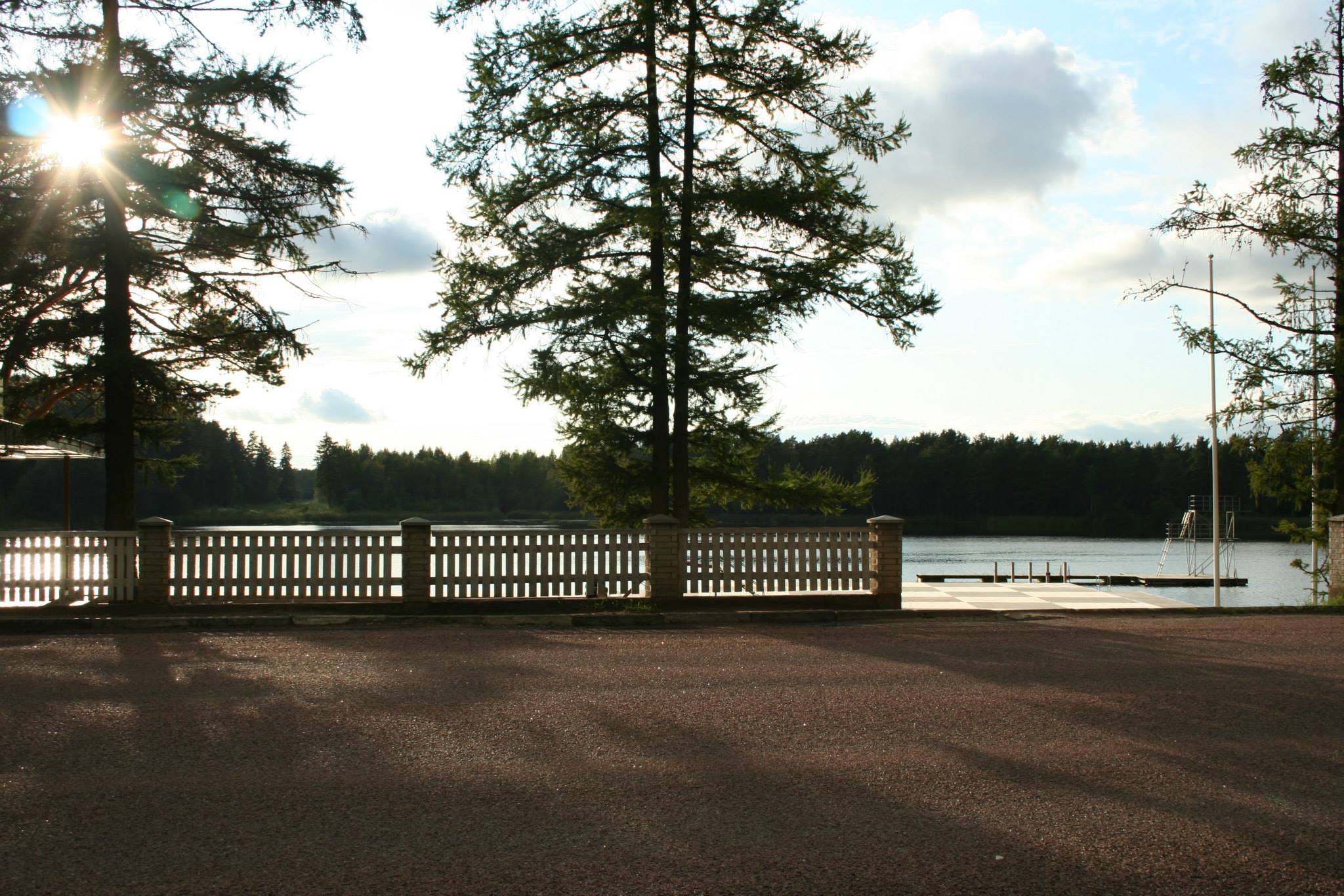 Vaade Verevi järvele Ujula peatusest